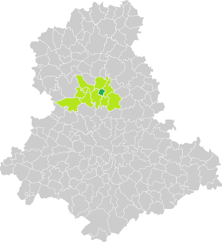 Carte de situation de la commune du Buis (en vert foncé) dans le votre Canton (en vert clair) sur une carte des communes de la Haute-Vienne